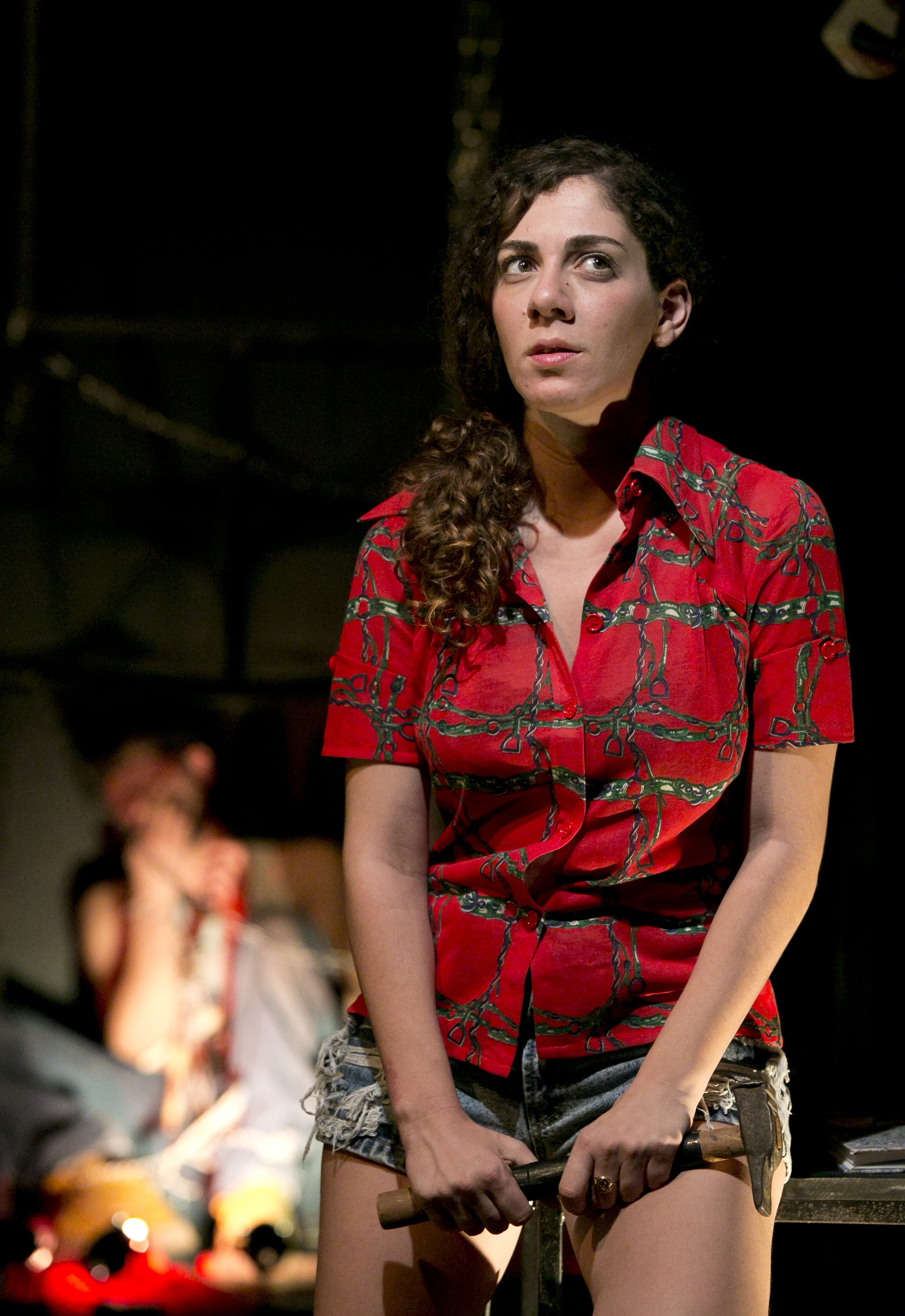 שרון דנון בהצגה יצרים בתיאטרון הסימטה, 2013